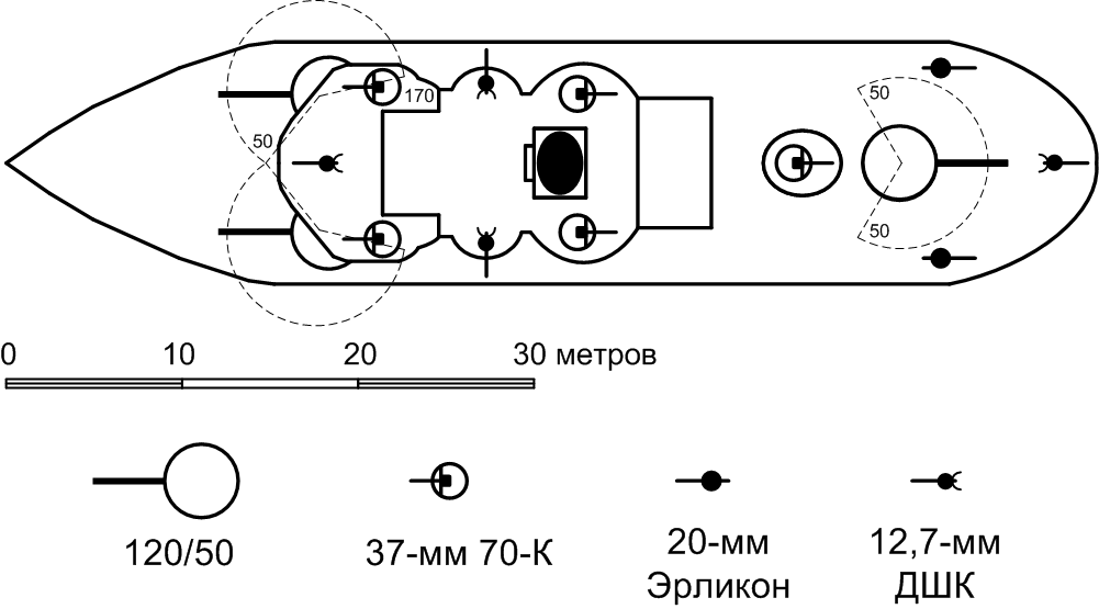 Схема размещения артиллерии монитора «Азов»